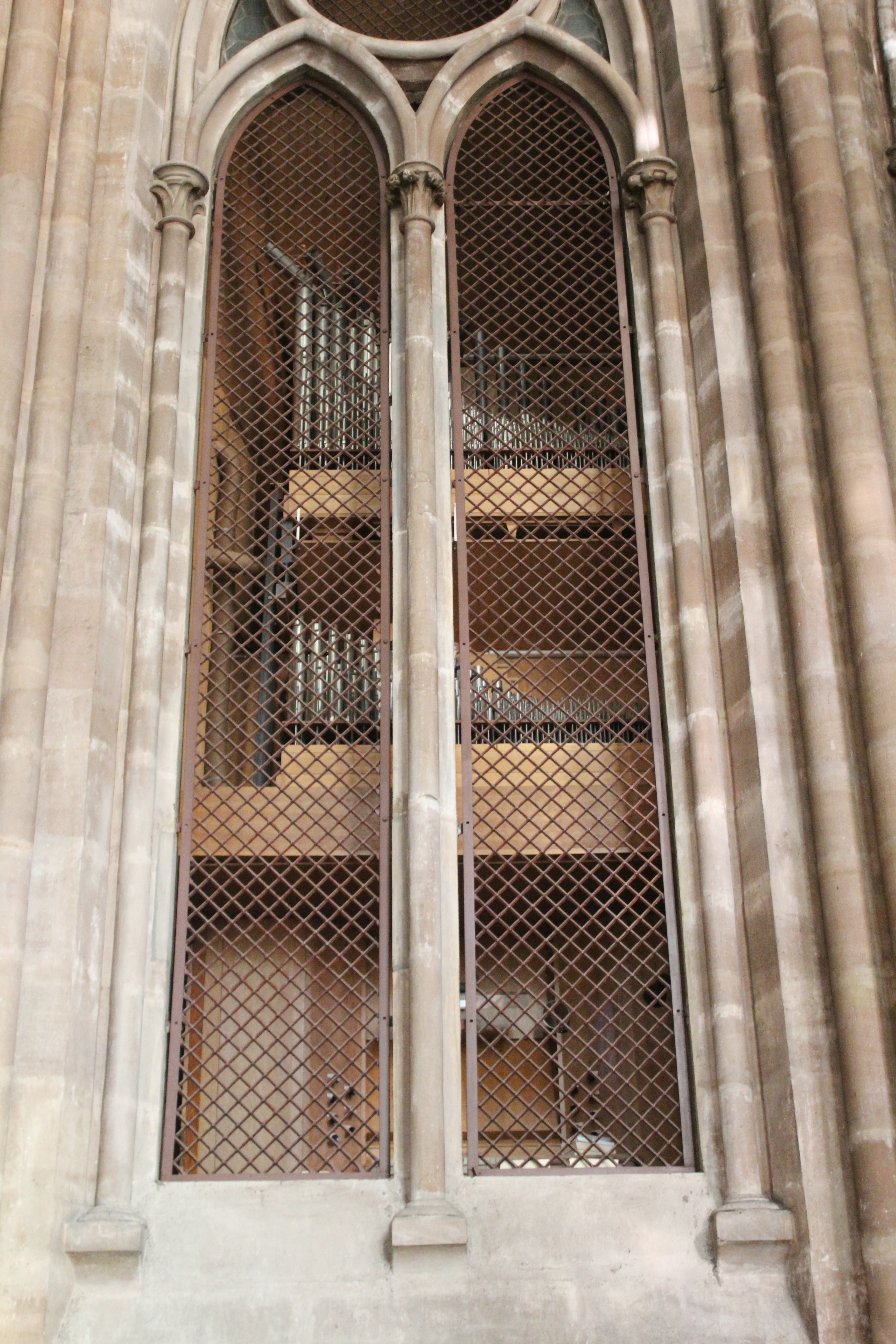 Chororgel der Elisabethkirche Marburg, Landkreis Marburg-Biedenkopf, Hessen, Deutschland